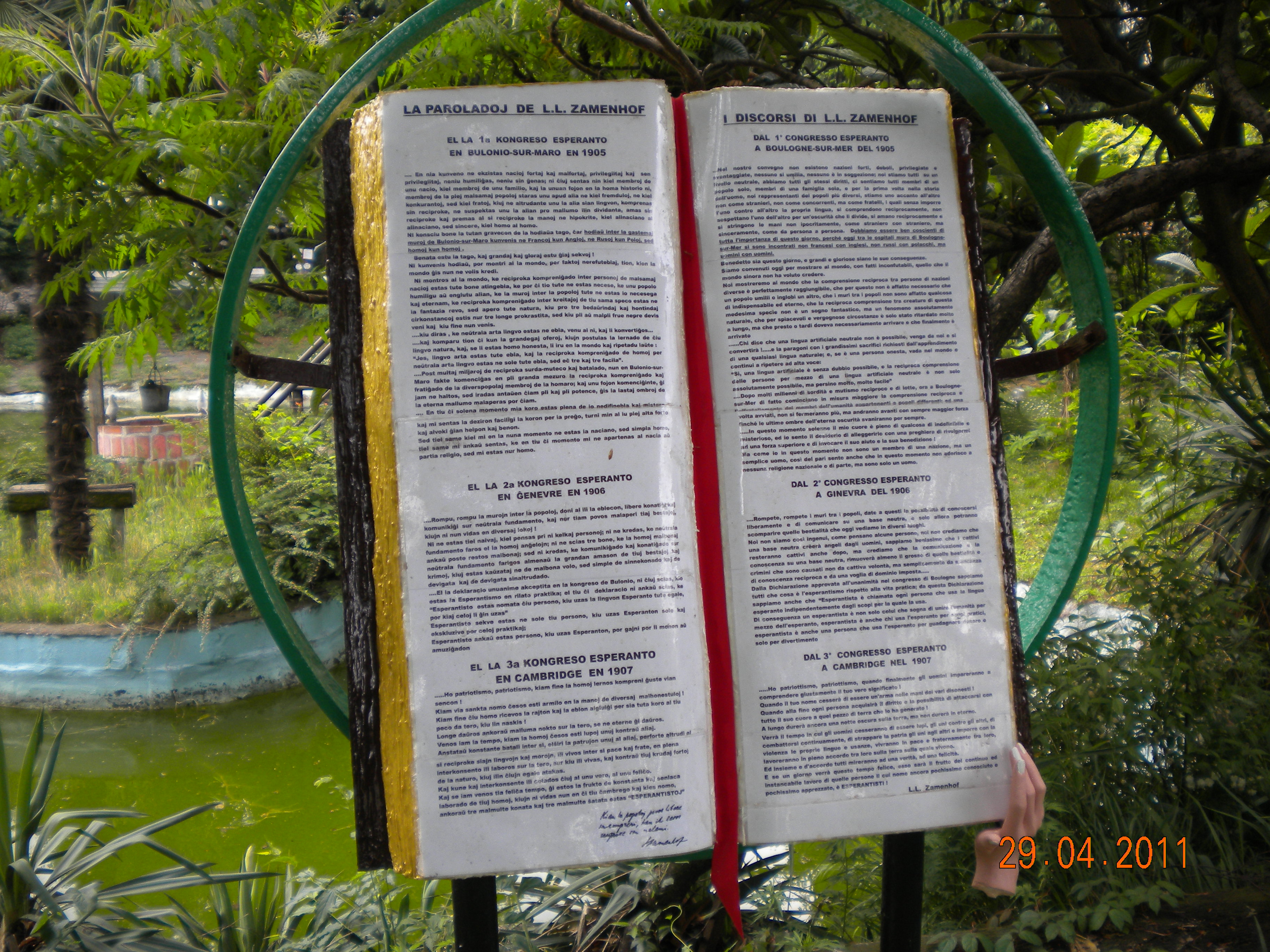 Libro gigante in legno (kg.20), che raccoglie alcuni brani dei discorsi di Zamenhof durante i primi 3 congressi di Esperanto. Sotto la pagina in esperanto la firma autentica di Zamenhof con una famosa frase. Sotto la traduzione in italiano, una mano di giovane donna, nell'atto di voltare le pagine del libro. Gianni (Giovanni) Conti (l'artista)